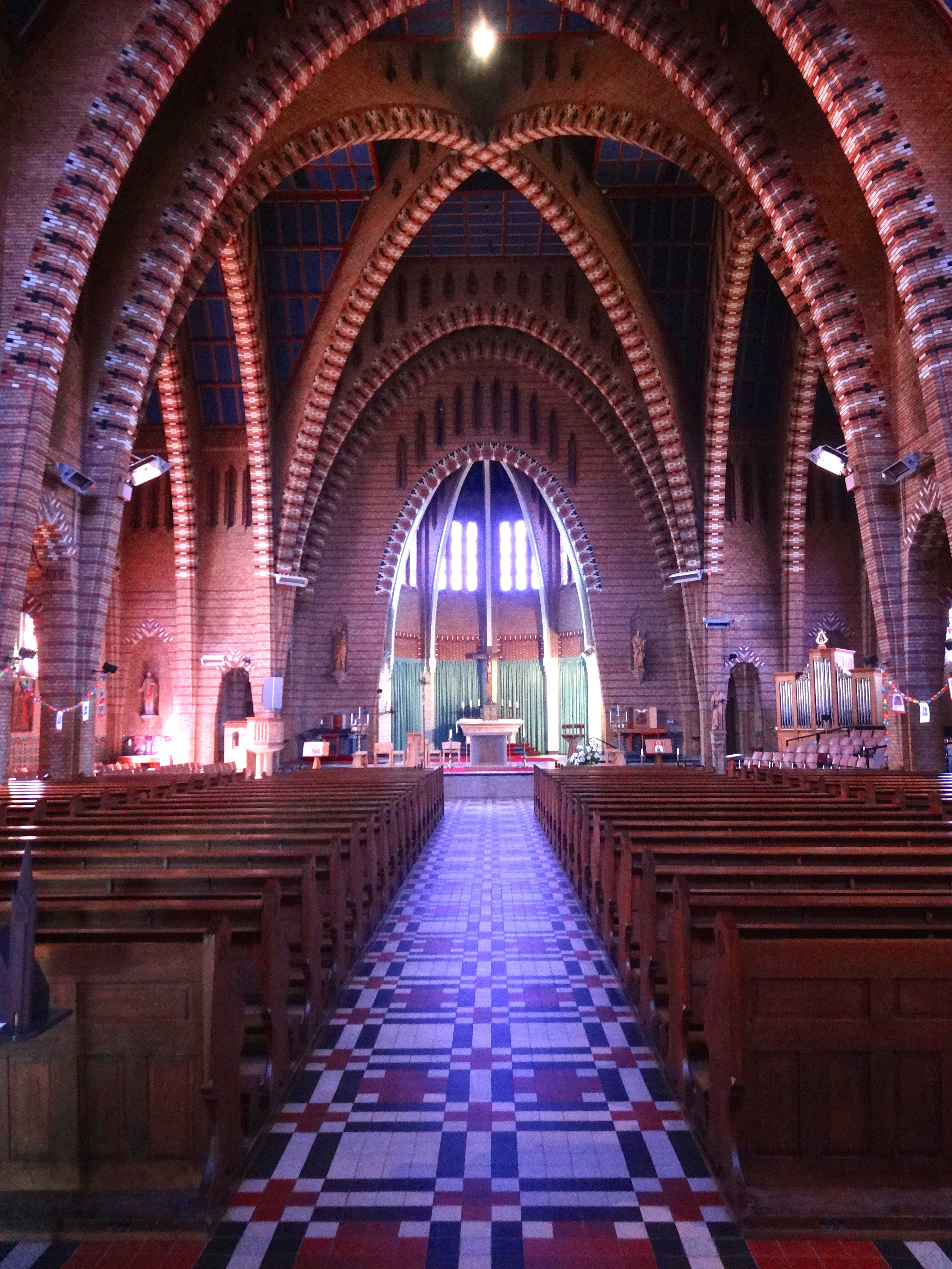 Sint-Franciscuskerk Bolsward